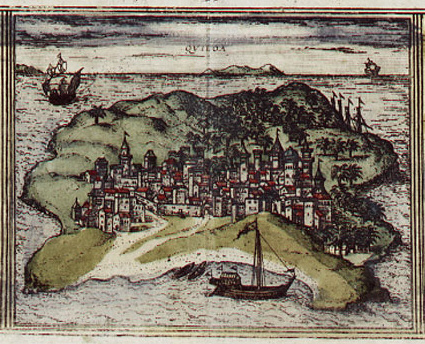 Quiloa / Kilwa